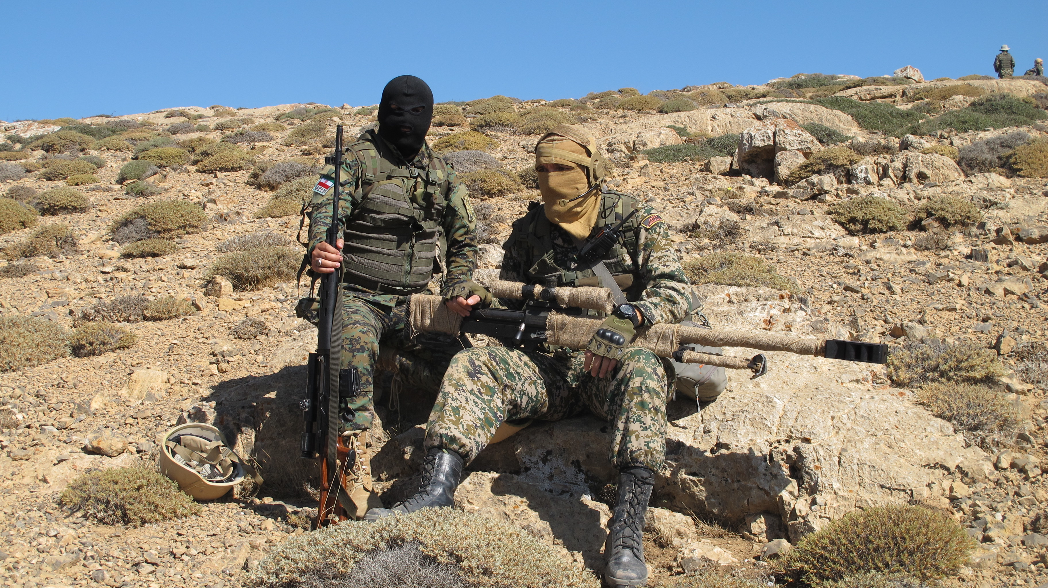 تکاوران ایرانی